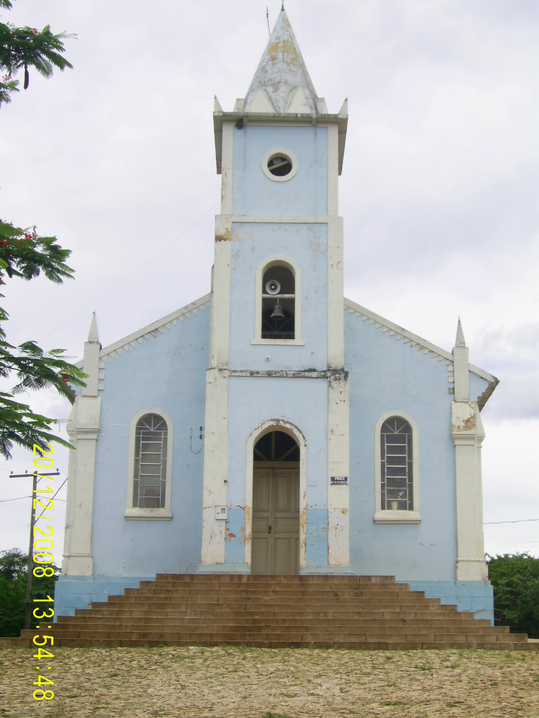 Igreja em Rodeador